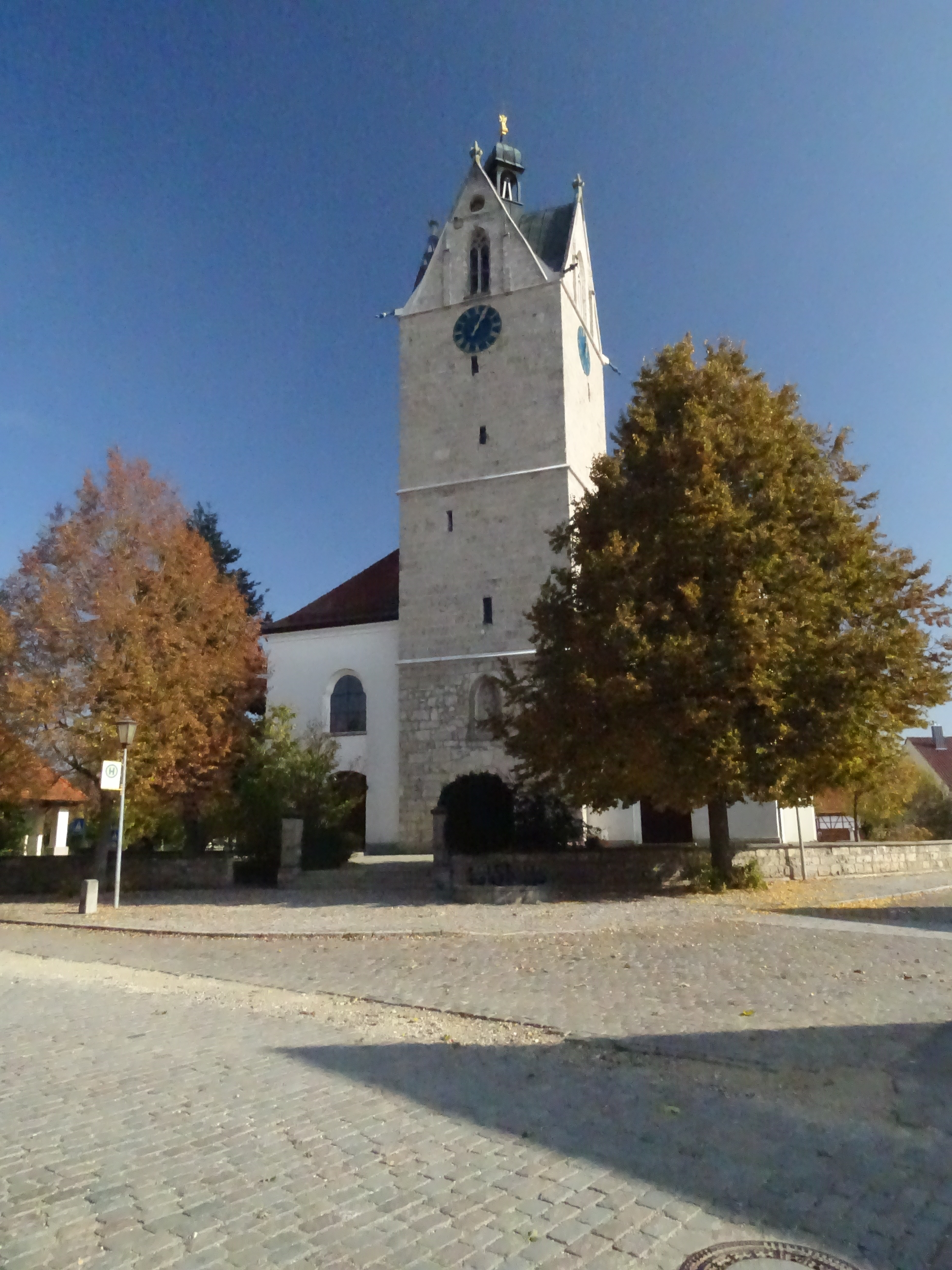 Katholische Pfarrkirche St. Martin in Altheim bei Riedlingen, Kreis Biberach.